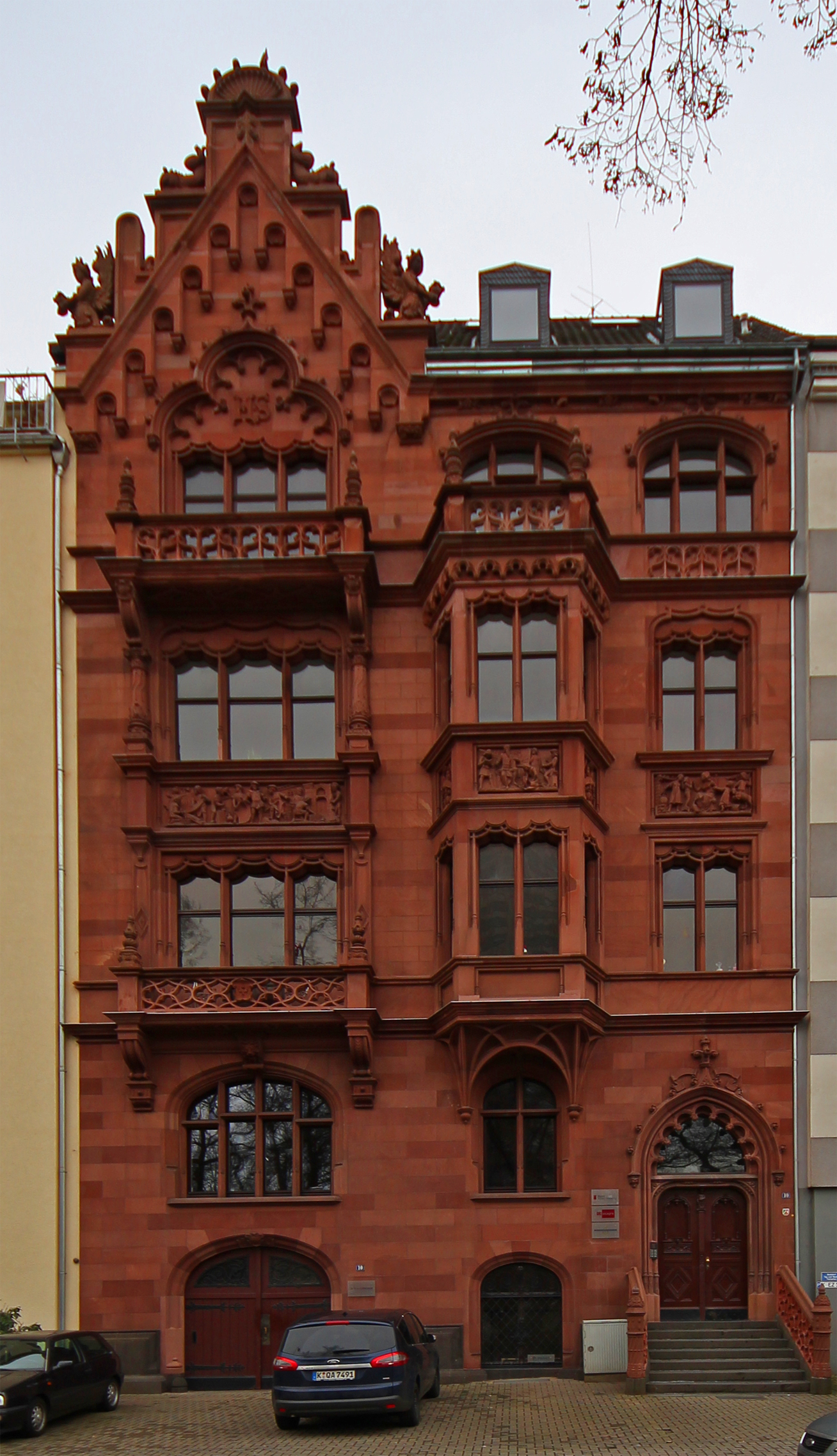 Haus Schierenberg in Köln-Altstadt Nord